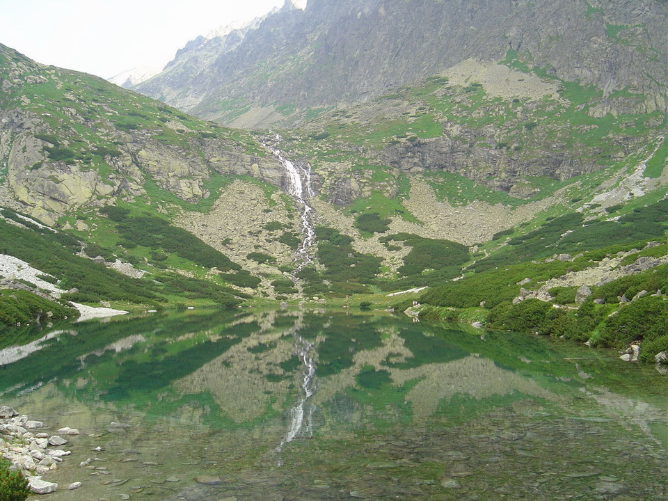 Velicky vodopad over Velicke pleso